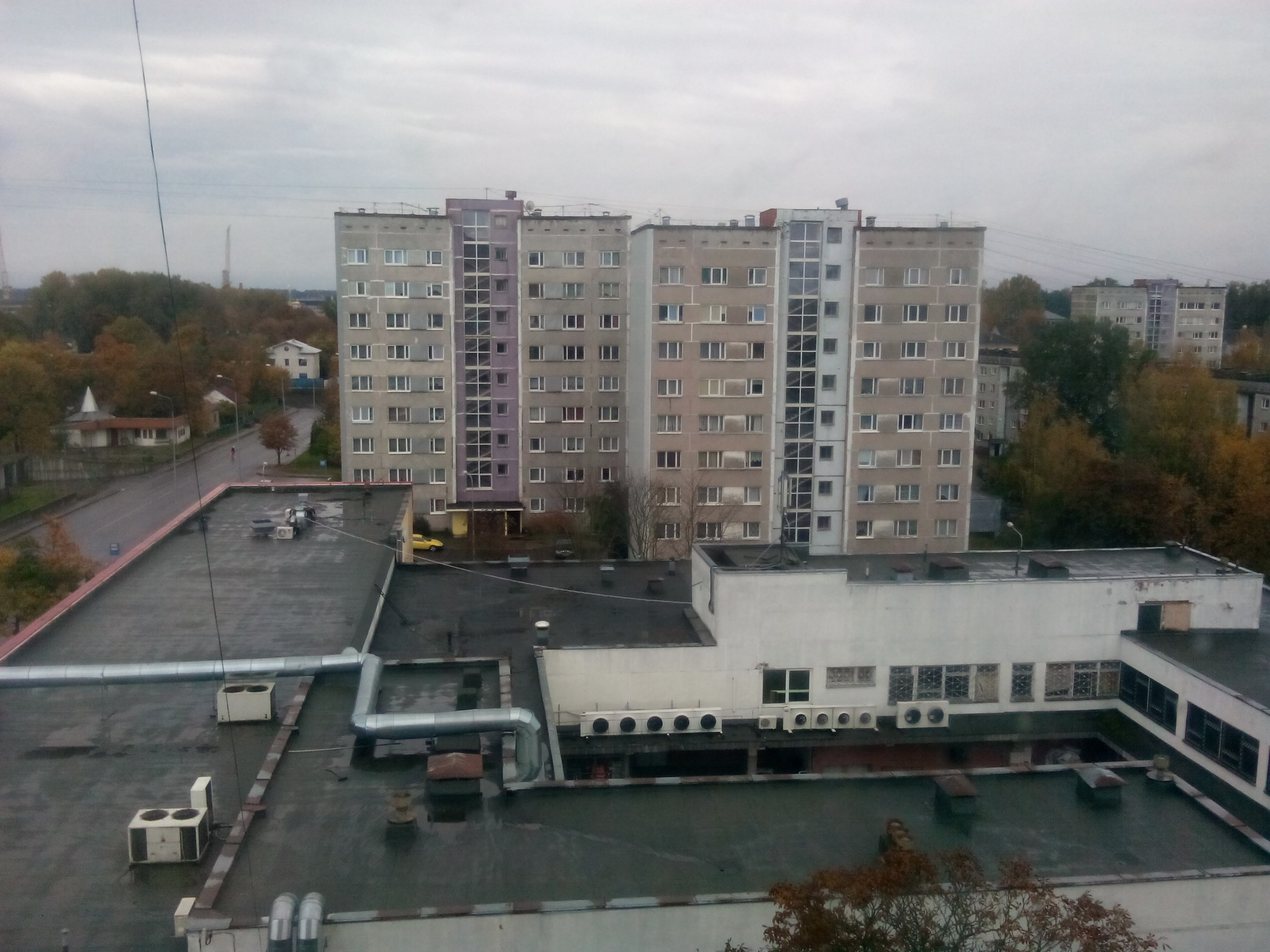 Вид из окна в микрорайоне Риги Вецмилгравис.